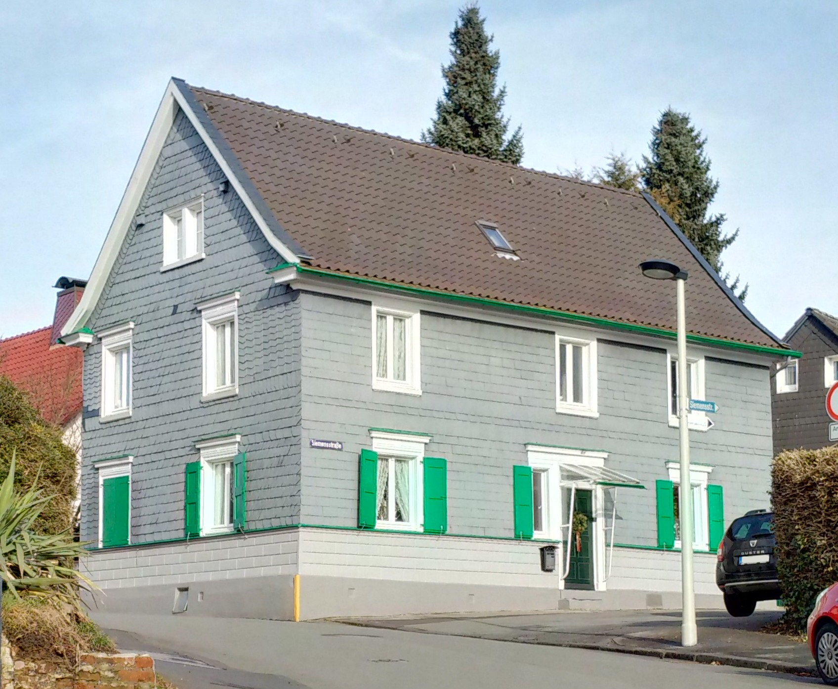 Baudenkmal an der Solinger Siemensstraße in Ohligs, aufgenommen im Winter 2016/2017